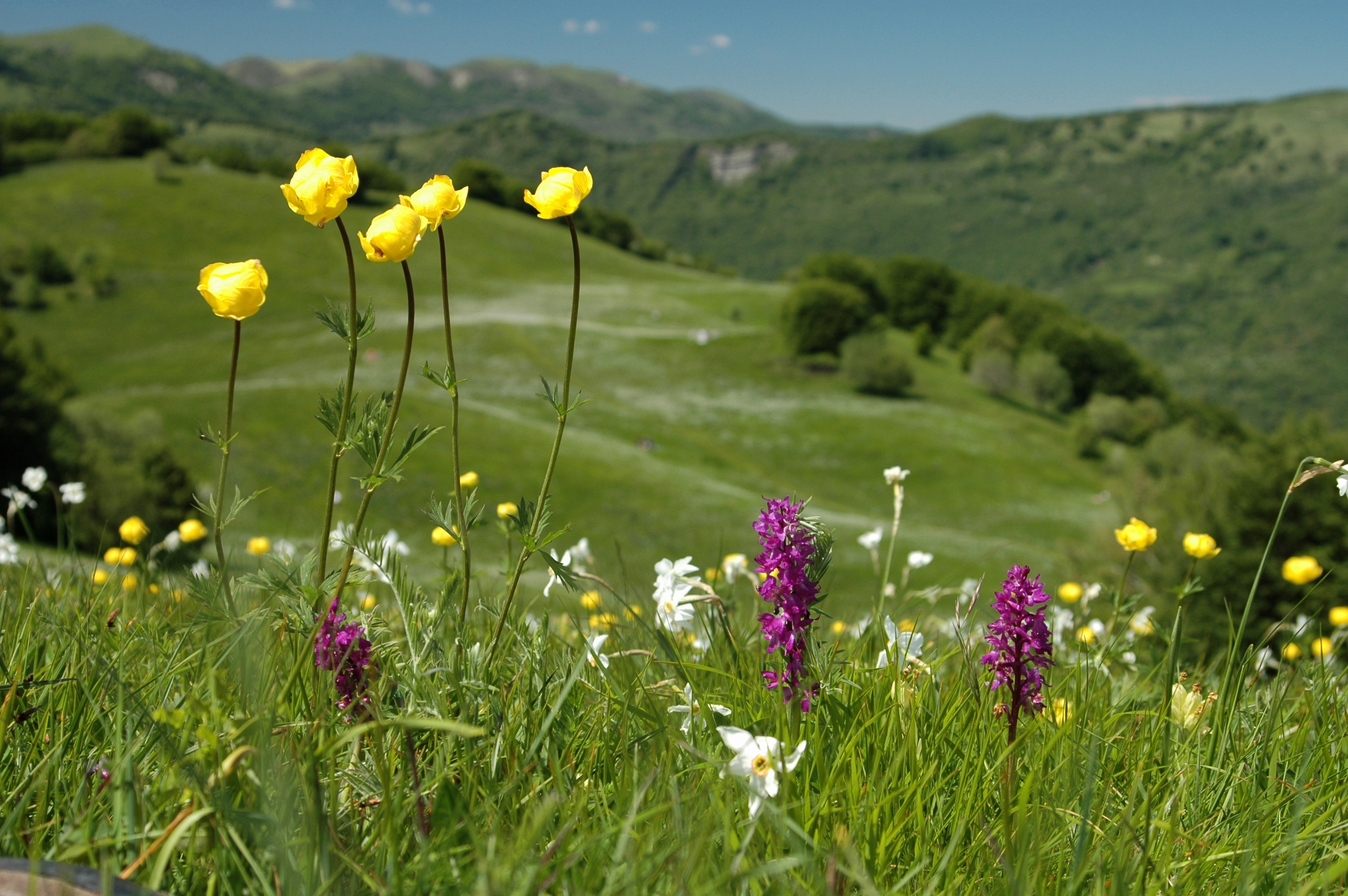 Fioritura al Pian della Cavalla (foto di A.Schiavi) nel Parco dell'Antola